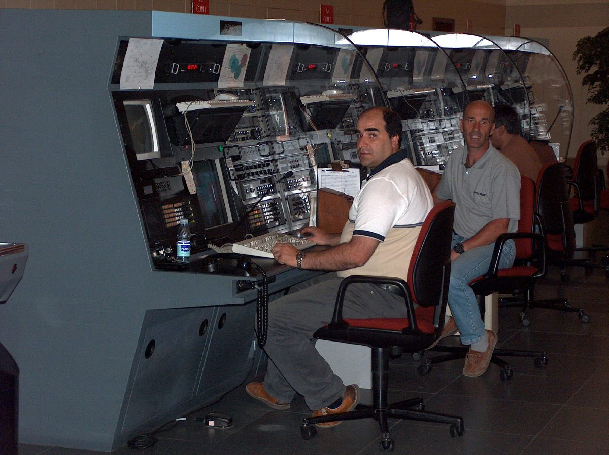 Operadores na estação aeronáutica de Santa Maria, Ano de 2004